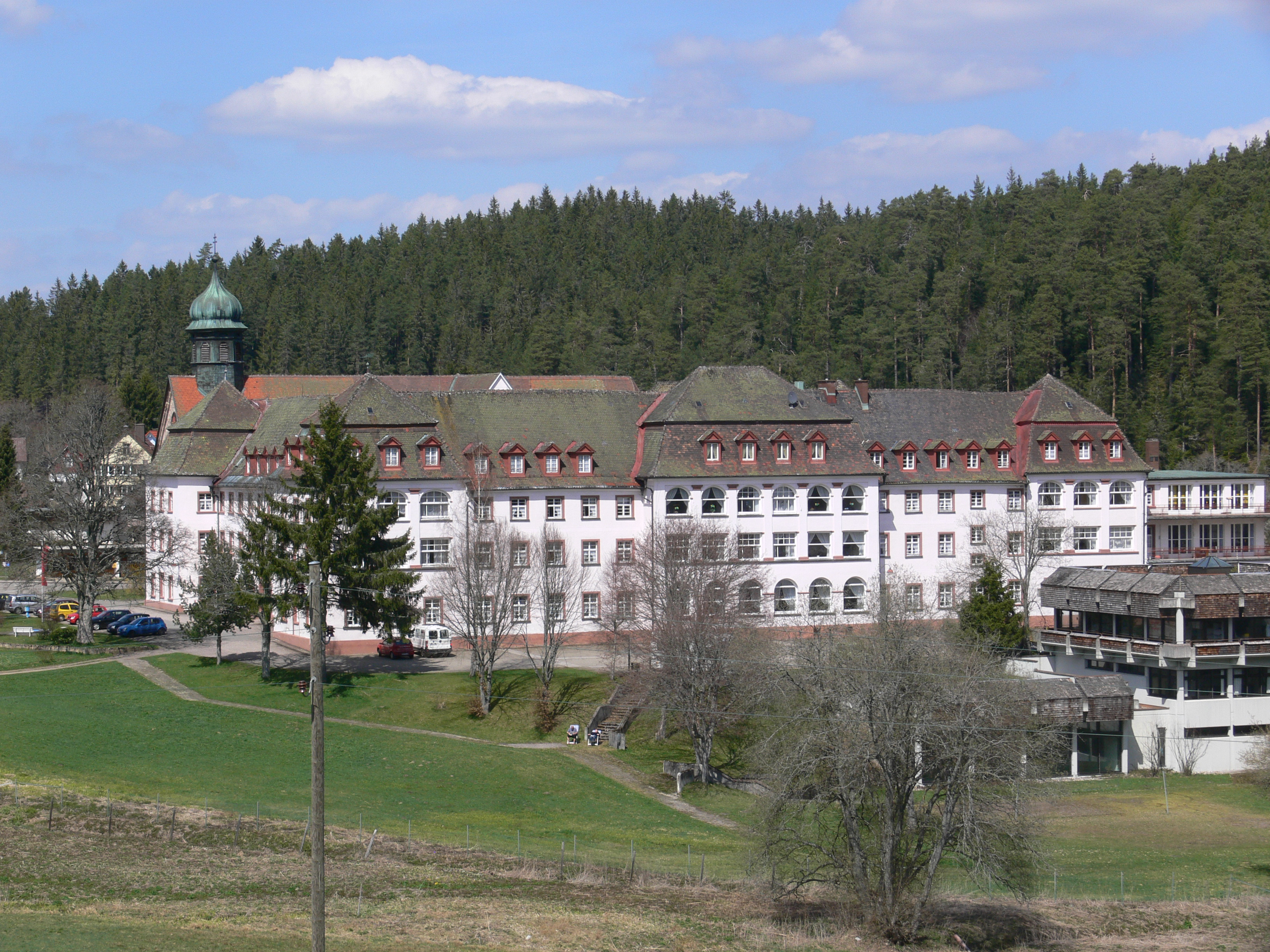 Friedenweiler, ehem. Klosteranlage („Schloss Friedenweiler“)